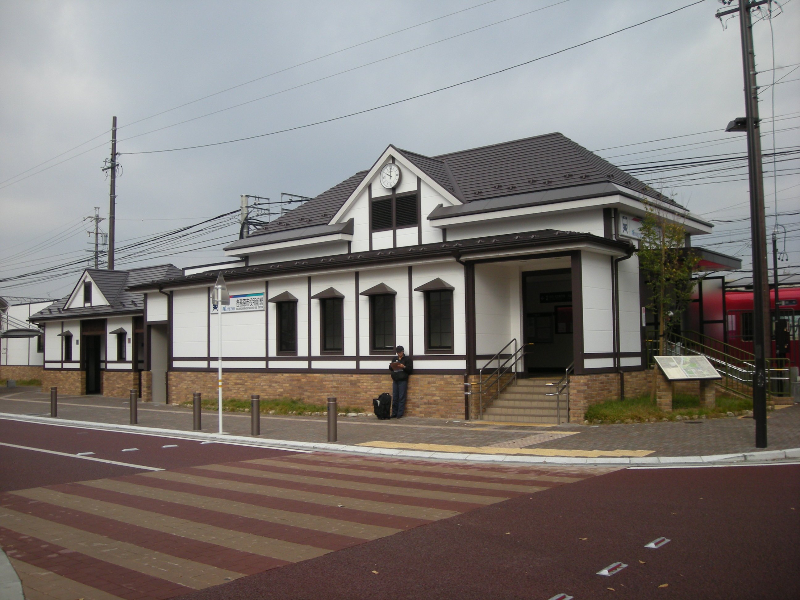 kakamigaharashiyakusyomae station（各務原市役所前駅）